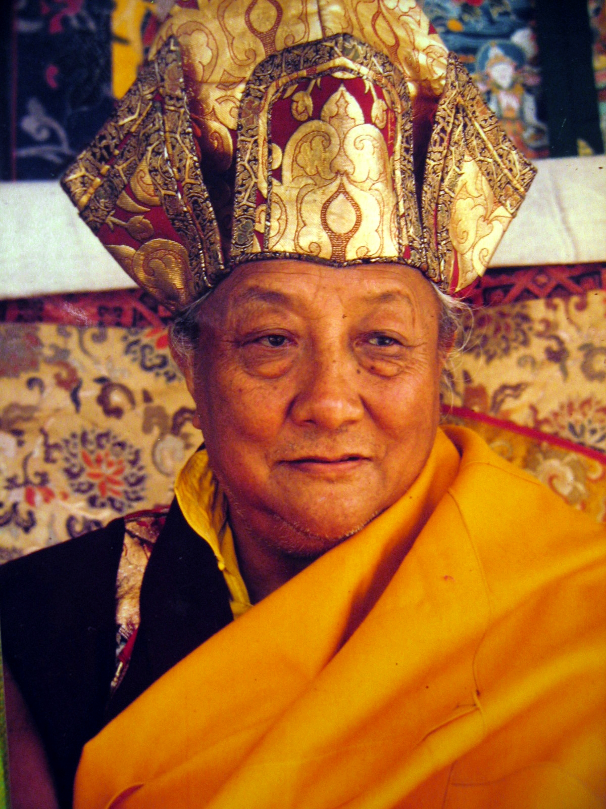 Дилго Кьенце Ринпоче